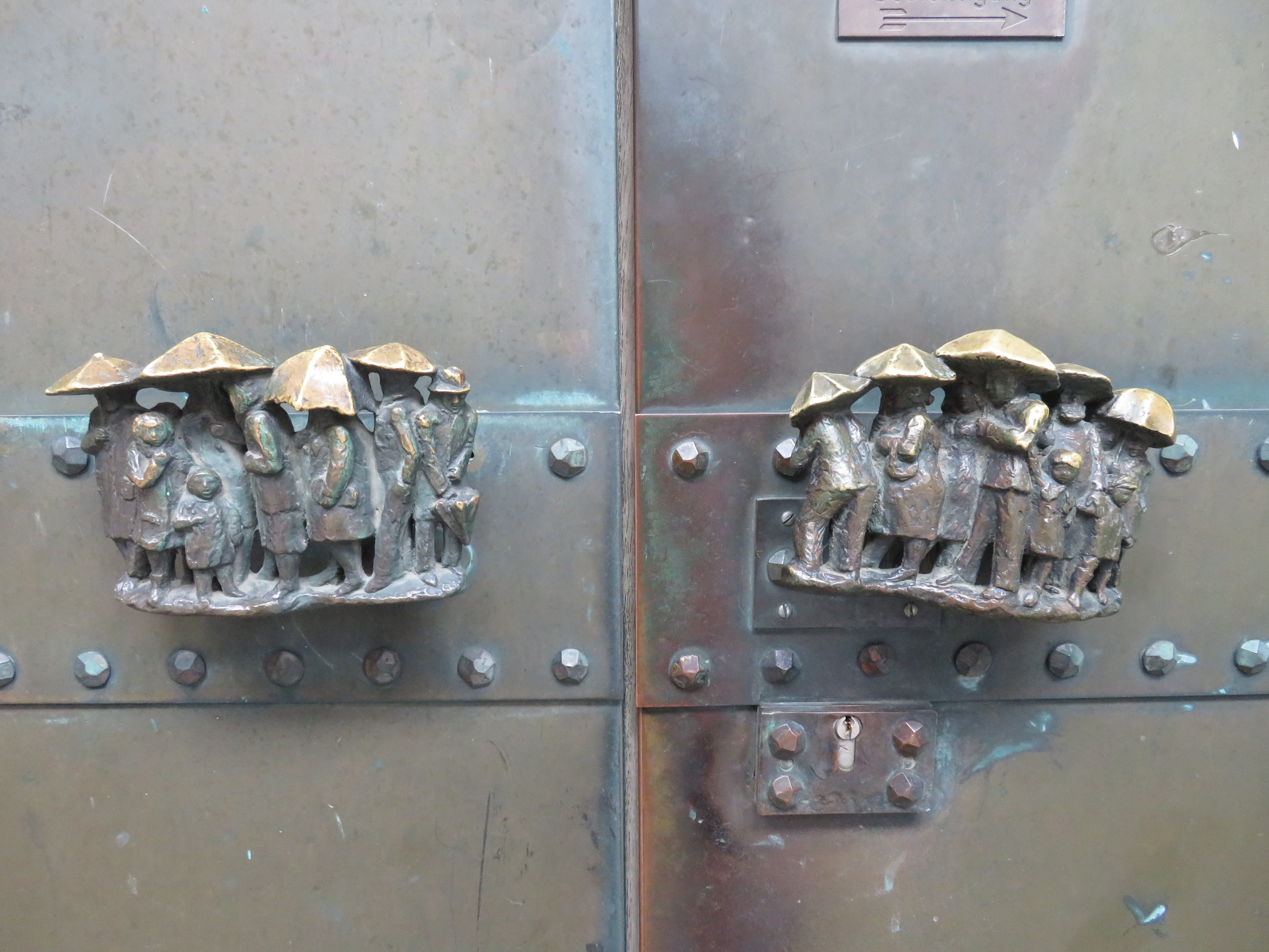 Türgriff am Briefkapellen-Portal der Marienkirche Lübeck von Ingeborg Bukor